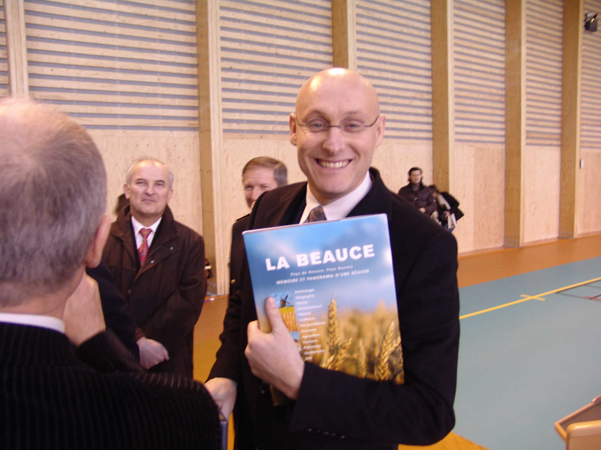 Bernard Laporte Secrétaire d'Etat chargé des Sports, délégué auprès de la ministre de la Santé, de la Jeunesse et des Sports Roselyne Bachelot